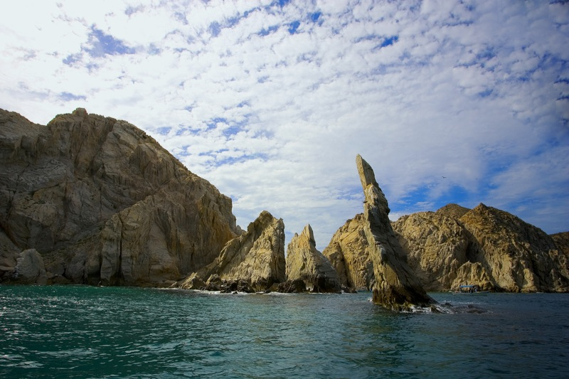 JJ7V7282_3.jpg Cabo San Lucas